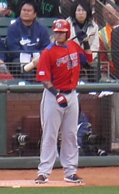 Yadier Molina